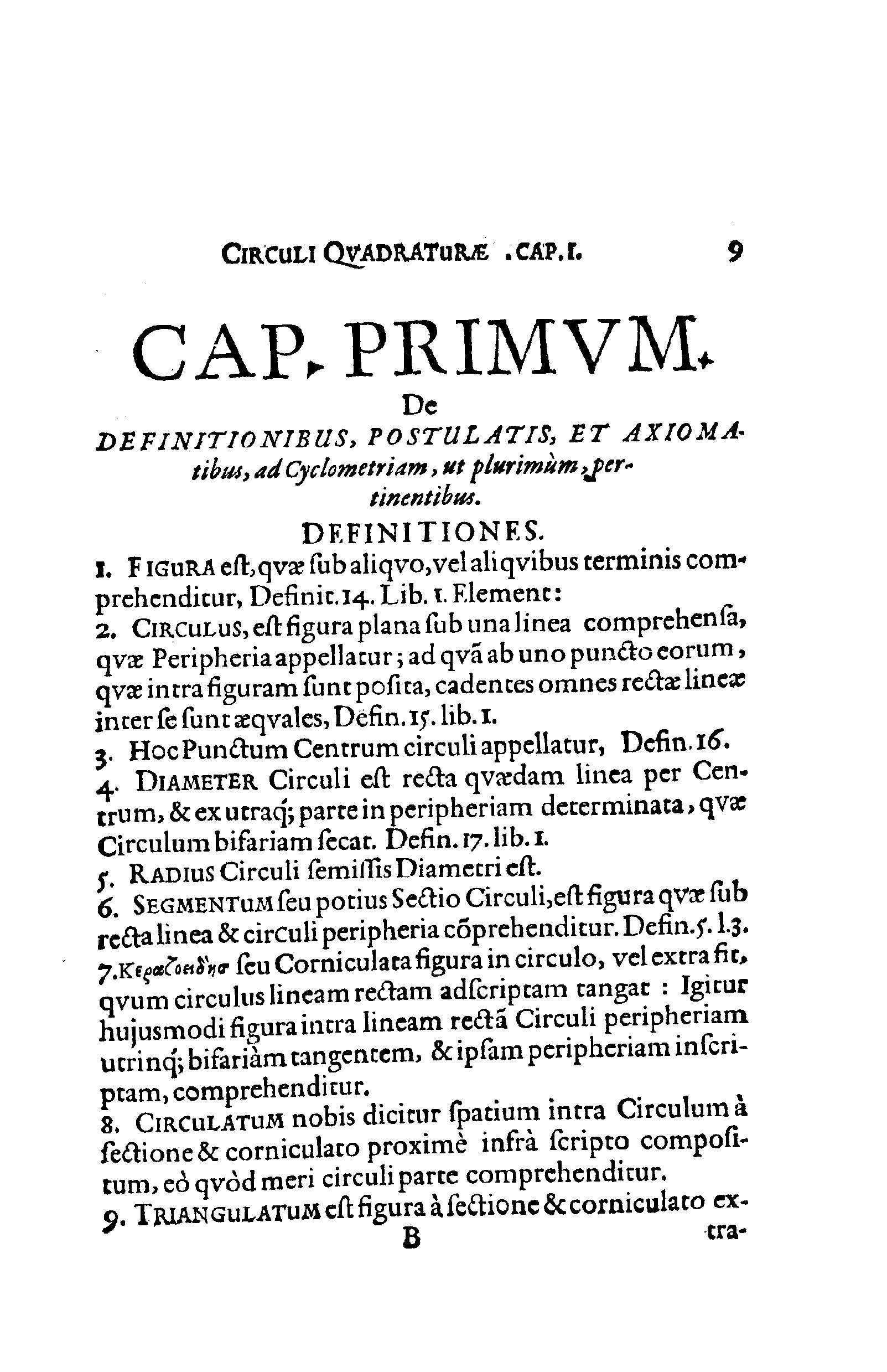 Christiani Severini Longomontani … Inventio quadraturae circuli, nempe I. Symmetriae lineae rectae & circularis longitudine. II. Aequalitatis lineae rectae & circularis III. Rationis diametri circuli ad perimetrum ejusdem. …. - Hafniae : typis Tychonianis, 1634. - [8], 154, [2] p. ; 4º .